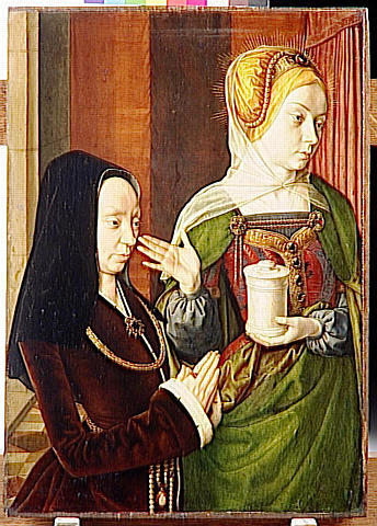 Portrait présumé de Madeleine de Bourgogne, dame de Laage, présentée par Sainte Madeleine. Peint par Jean Hey.